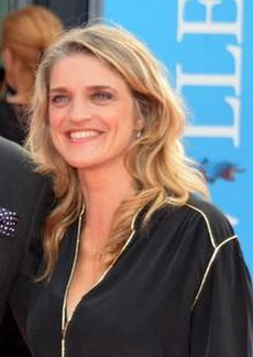 Olivia Côte au festival de Deauville.